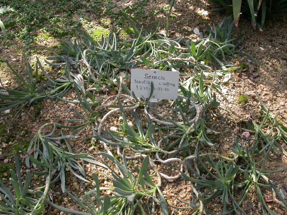 Senecio toxotis